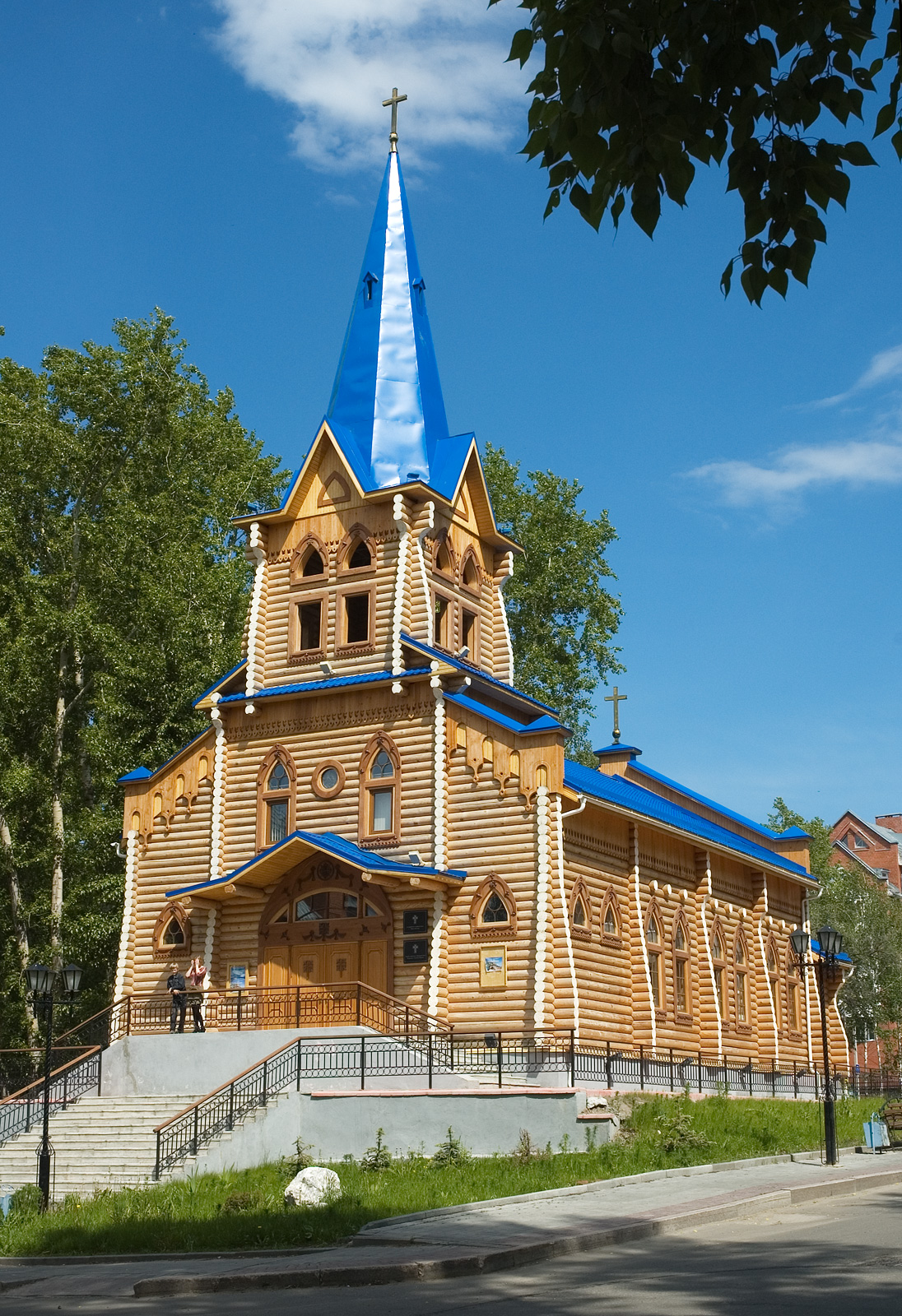 Кирха Святой Марии, ул. Карташова, 28.